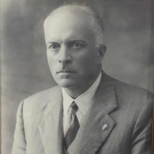 Aldo Vanini, sindaco di Brinzio 1945-1956.